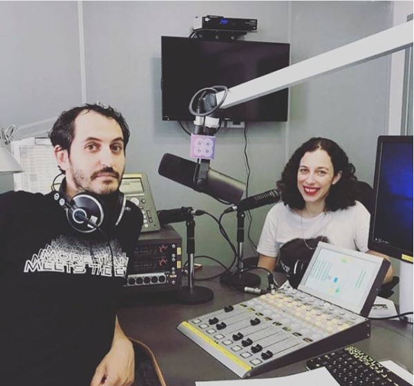 ניר גורלי טל ארגמן ספיישל ארקטיק מאנקיז של תחנת כאן 88